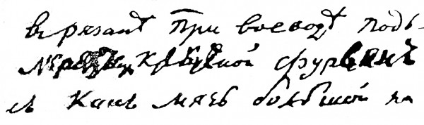 Запись А. И. Сулакадзева о Крякутном (1819) с правкой предположительно А. А. Родных (около 1900)